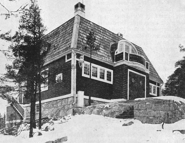 Villa Gärdsgården (fasad mot norr), Sturevägen 37, arkitekt Ragnar Östberg, byggherre Alf Wallander